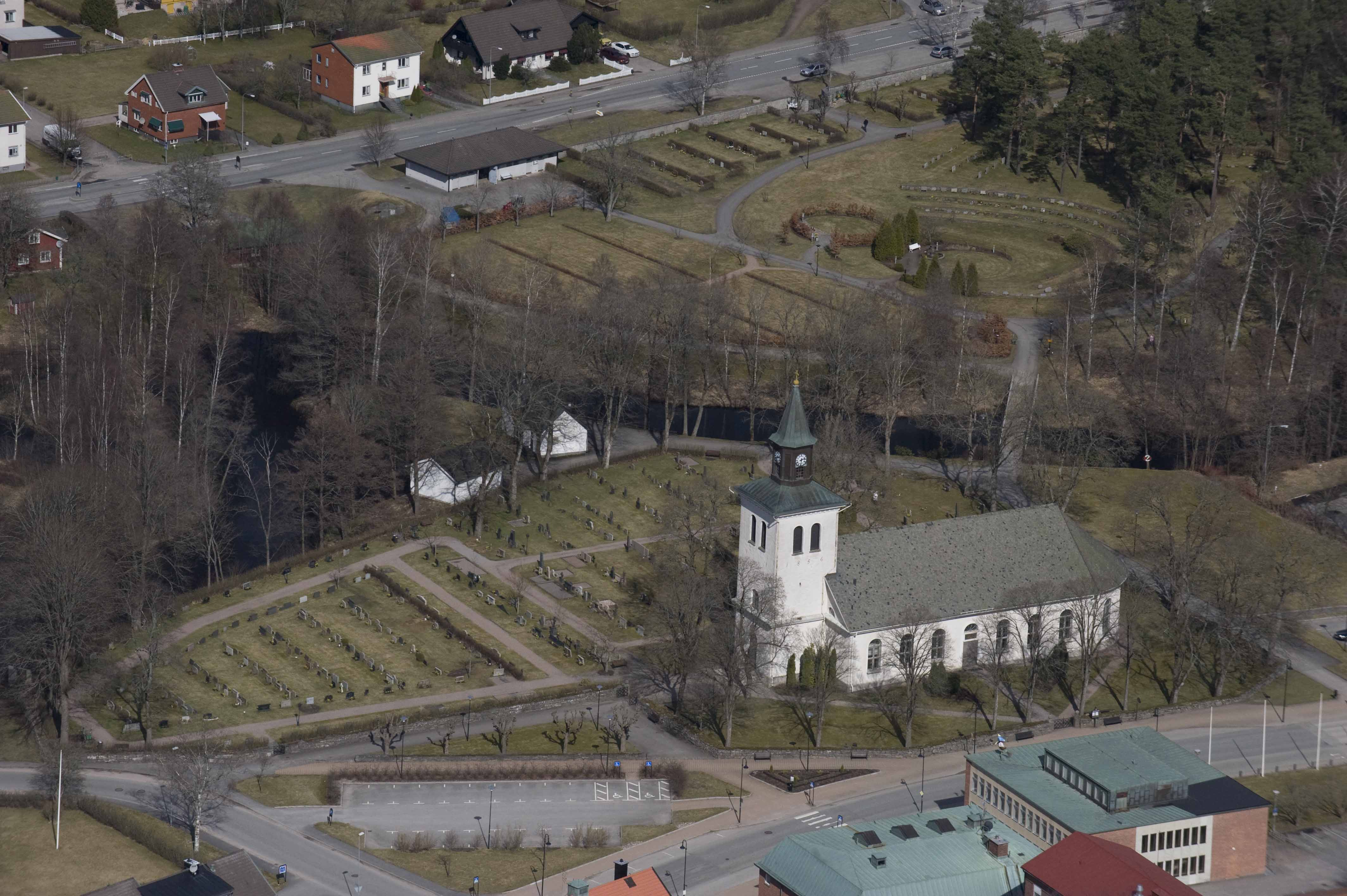 Anderstorps kyrka från luften